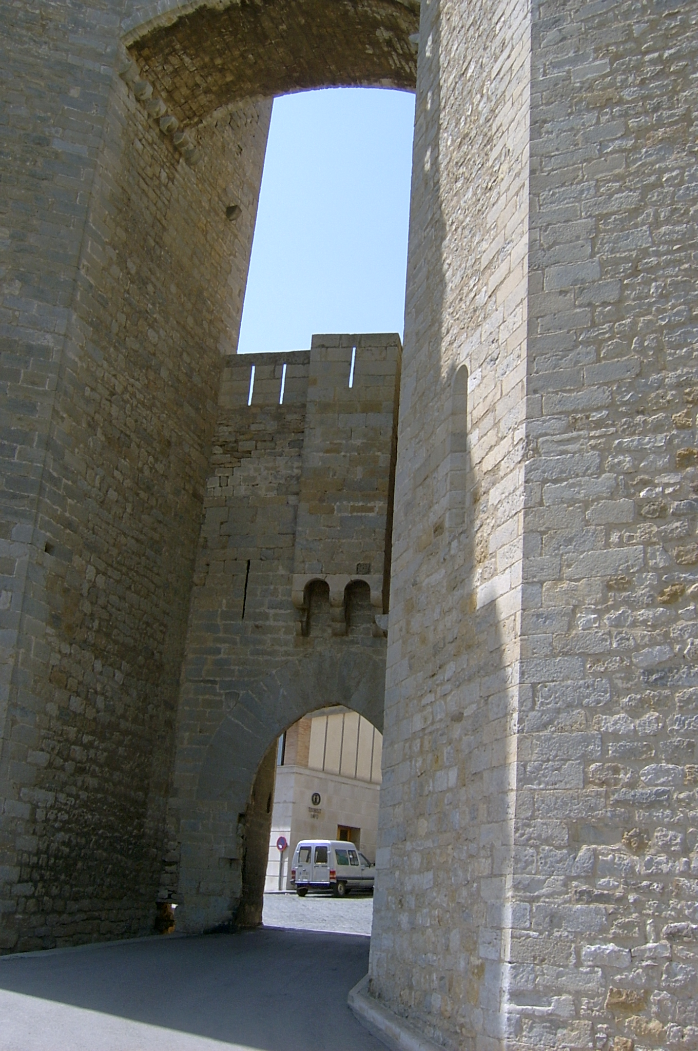 Una de las puertas de la murralla medieval que rodea el casco urbano de la localidad de Morella. Fotografia tomada en Junio de 2005.